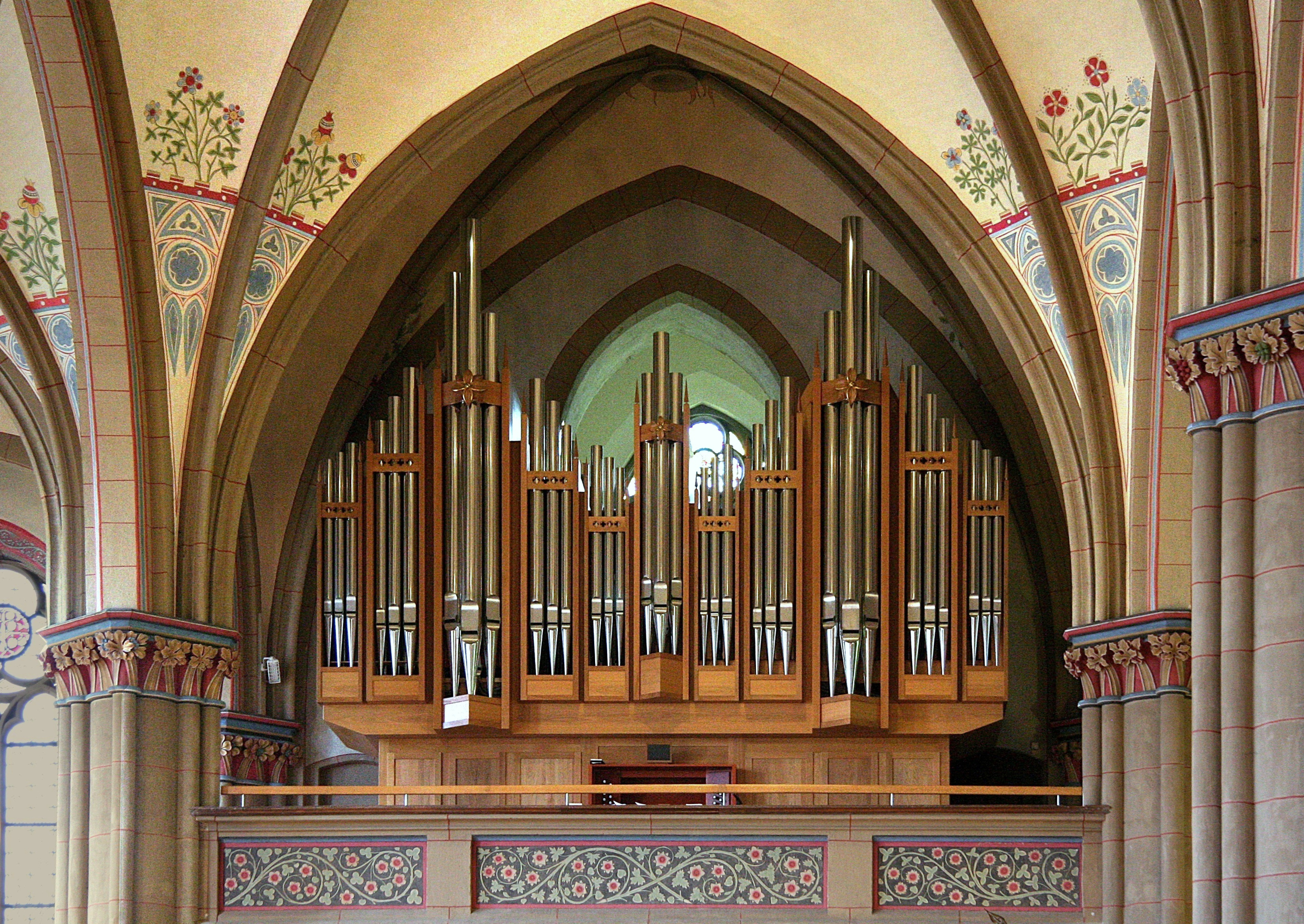 Pfarrkirche Maria Himmelfahrt Mülheim, Mayer-Orgel aus dem Jahr 2000